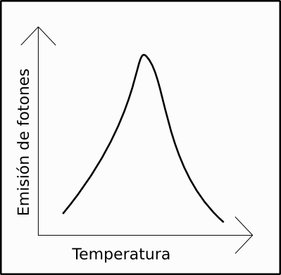 Esquema de una curva de brillo de un material termoluminiscente.